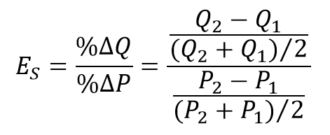 Výpočet cenové elasticity nabídky